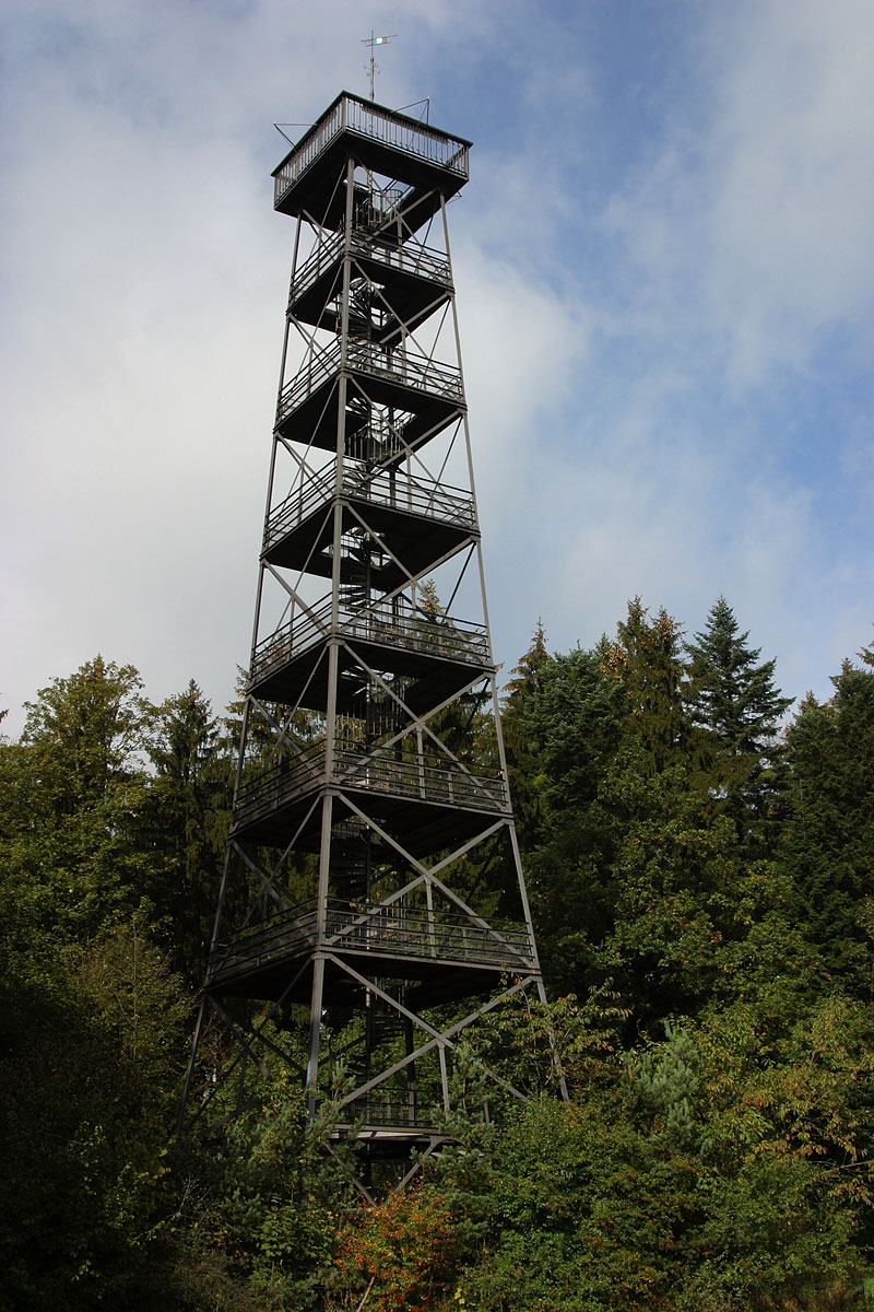 Aussichtsturm auf dem Pfannenstiel